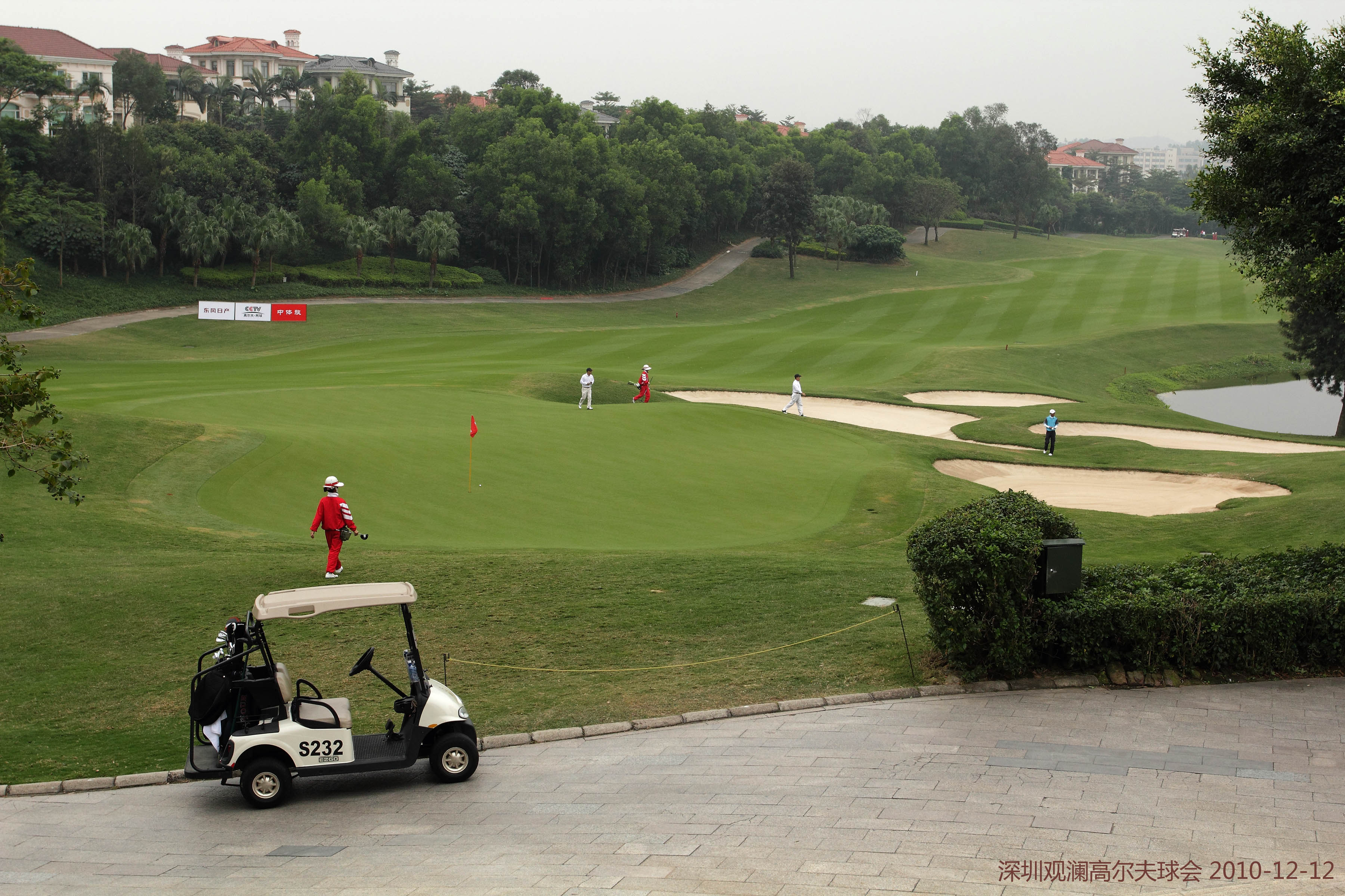 观澜高尔夫球场 Mission Hills